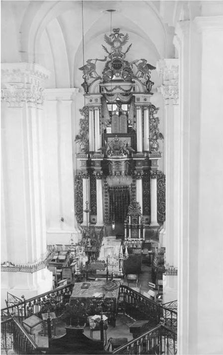 Интерьер Большой синагоги в Кременце.